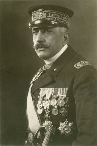 Alfredo Acton olasz tengerész, admirális